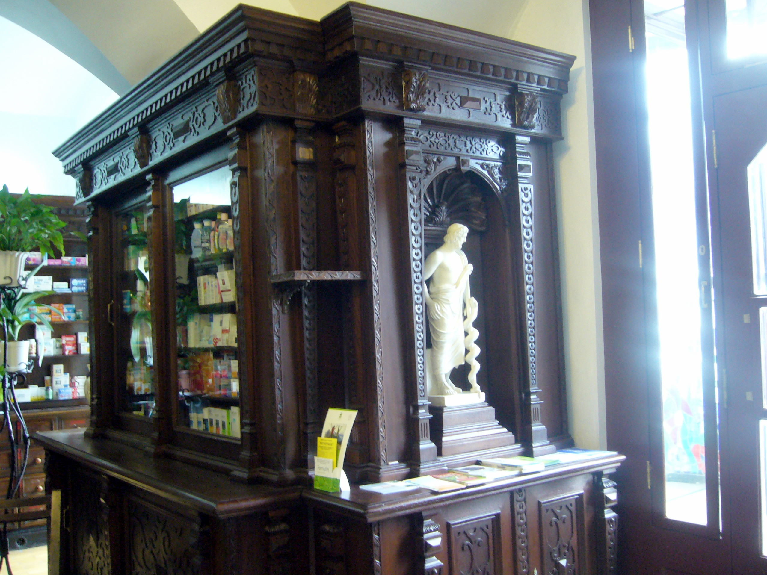 Apteka "Pod Jeleniem" przy Rynku w Bielsku-Białej.